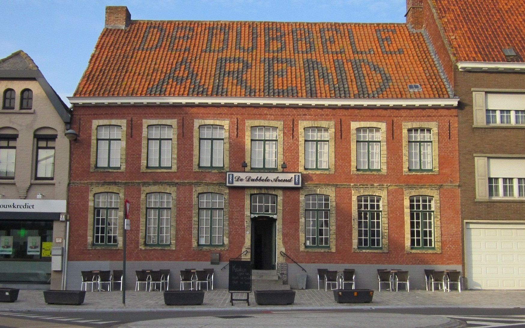 Eetcafé De Dubbele Arend in Hooglede 08″ N, 3° 04′ 53.4″ E